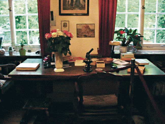 Bearbeitete Version von Image:Juengerschreibtisch.jpg durch Rainer Zenz Original-Beschreibung: (Uploaded by Benutzer:The weaver) Ernst Jüngers Schreibtisch im Jünger Haus in Wilflingen, Kreis Biberach. Mit Genehmigung von Weberberg.de, Website für Biberach veröffentlicht. thumb|Original